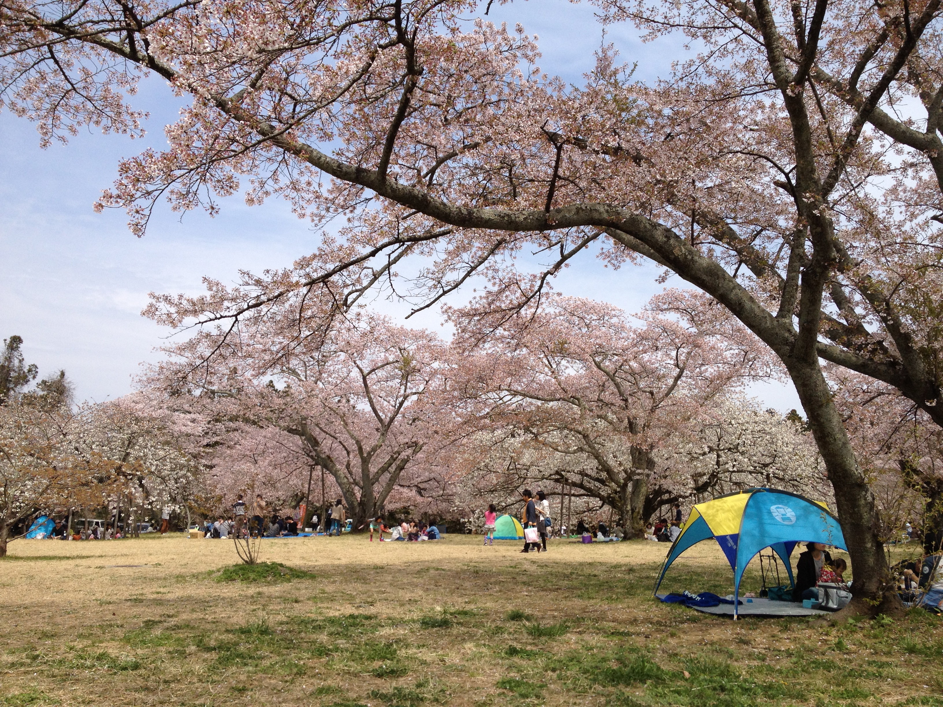 三神峯公園の桜（2015年4月）